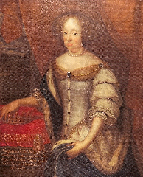 Magdalena Sibylla von Schleswig-Holstein-Gottorf (1631-1719)